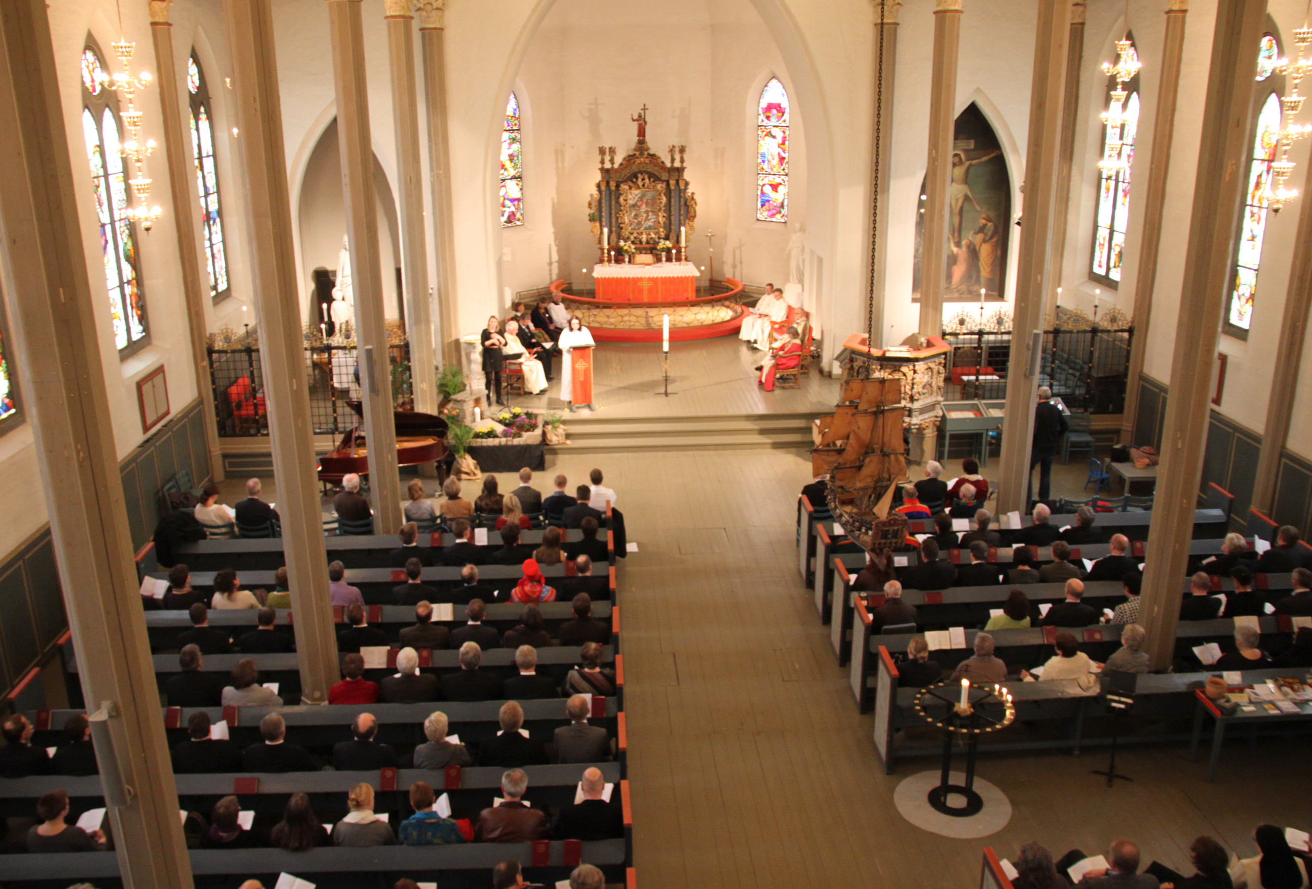 Fra åpningsgudstjenesten for Kirkemøtet 2012 i Tønsberg domkirke